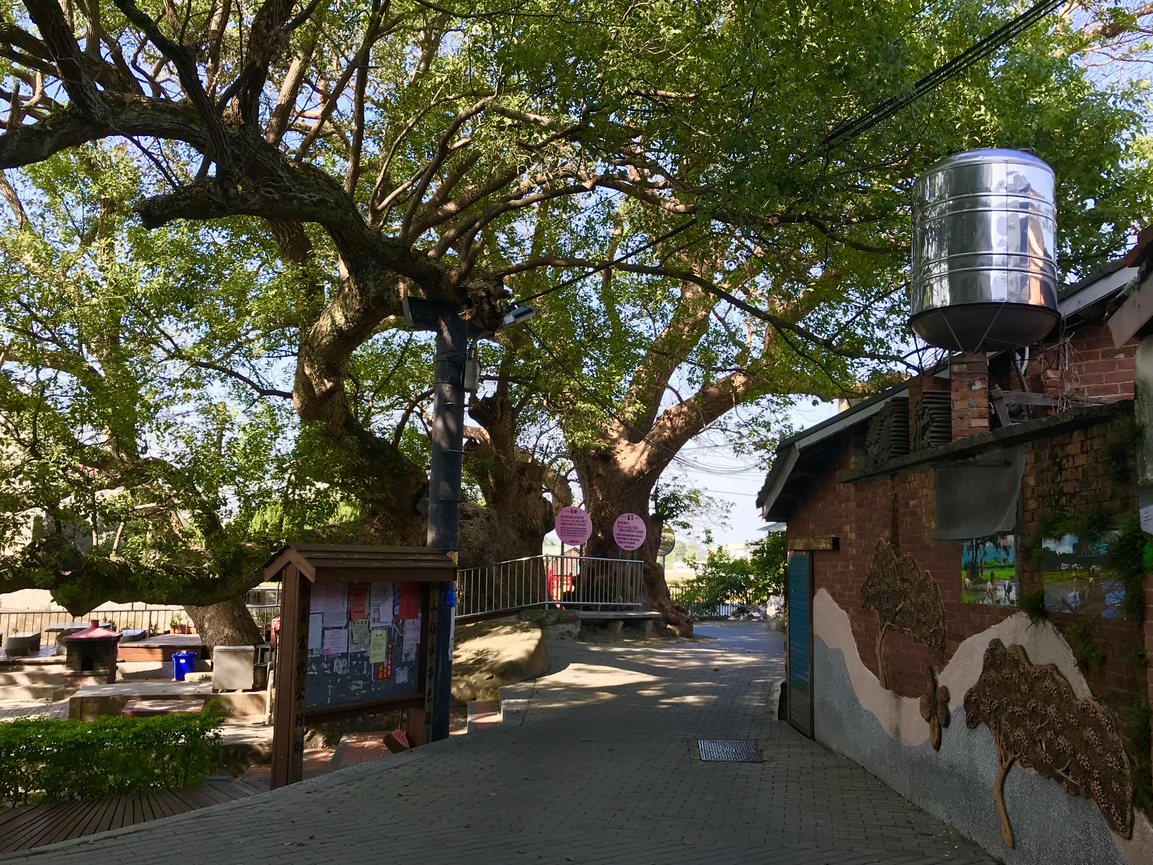 鶼鰈老樹近景